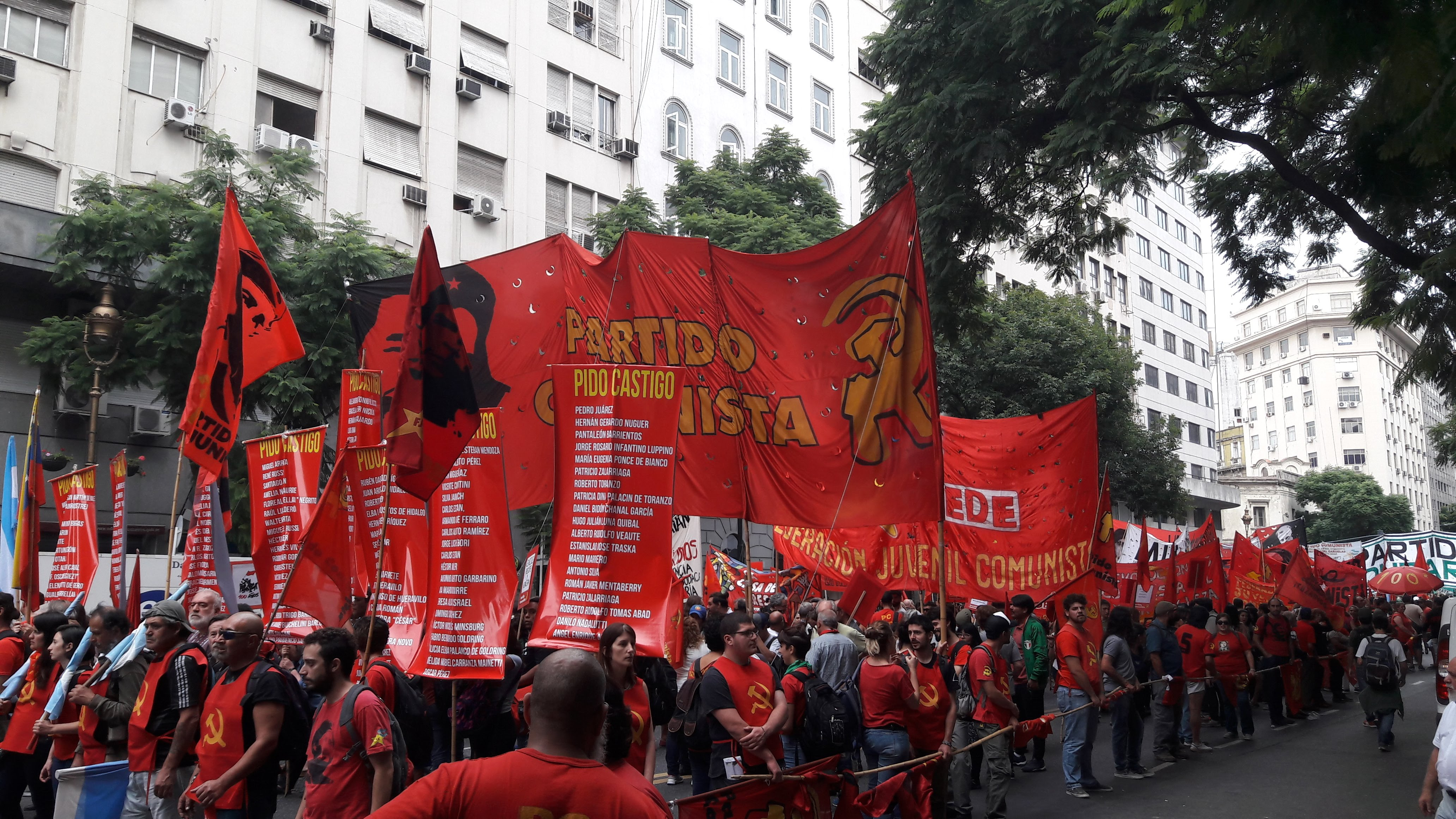 24M Marcha de la Memoria por la Verdad y Justicia en Buenos Aires, Argentina.